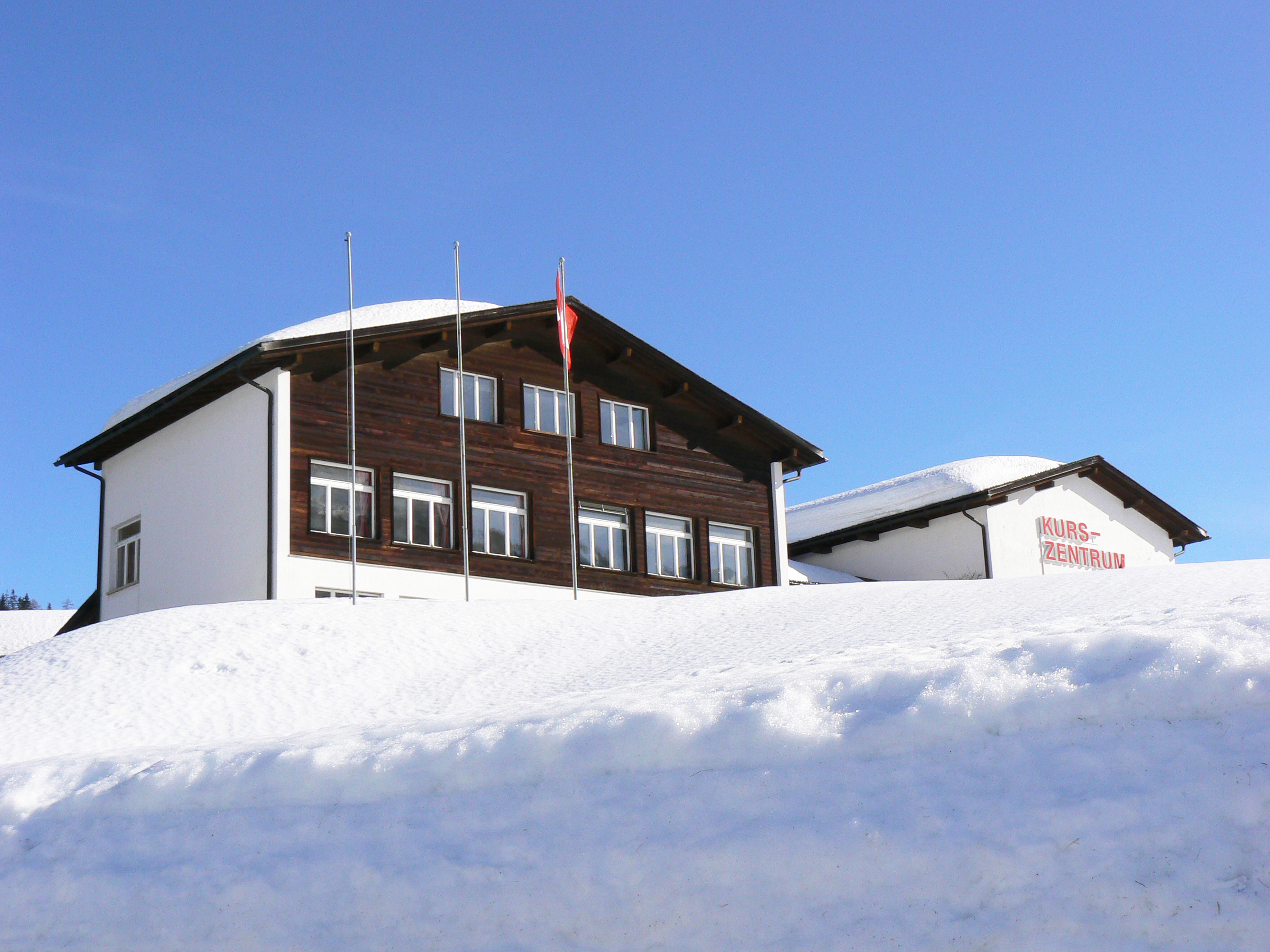 Wettbewerb Hanns Engi und Paul Held